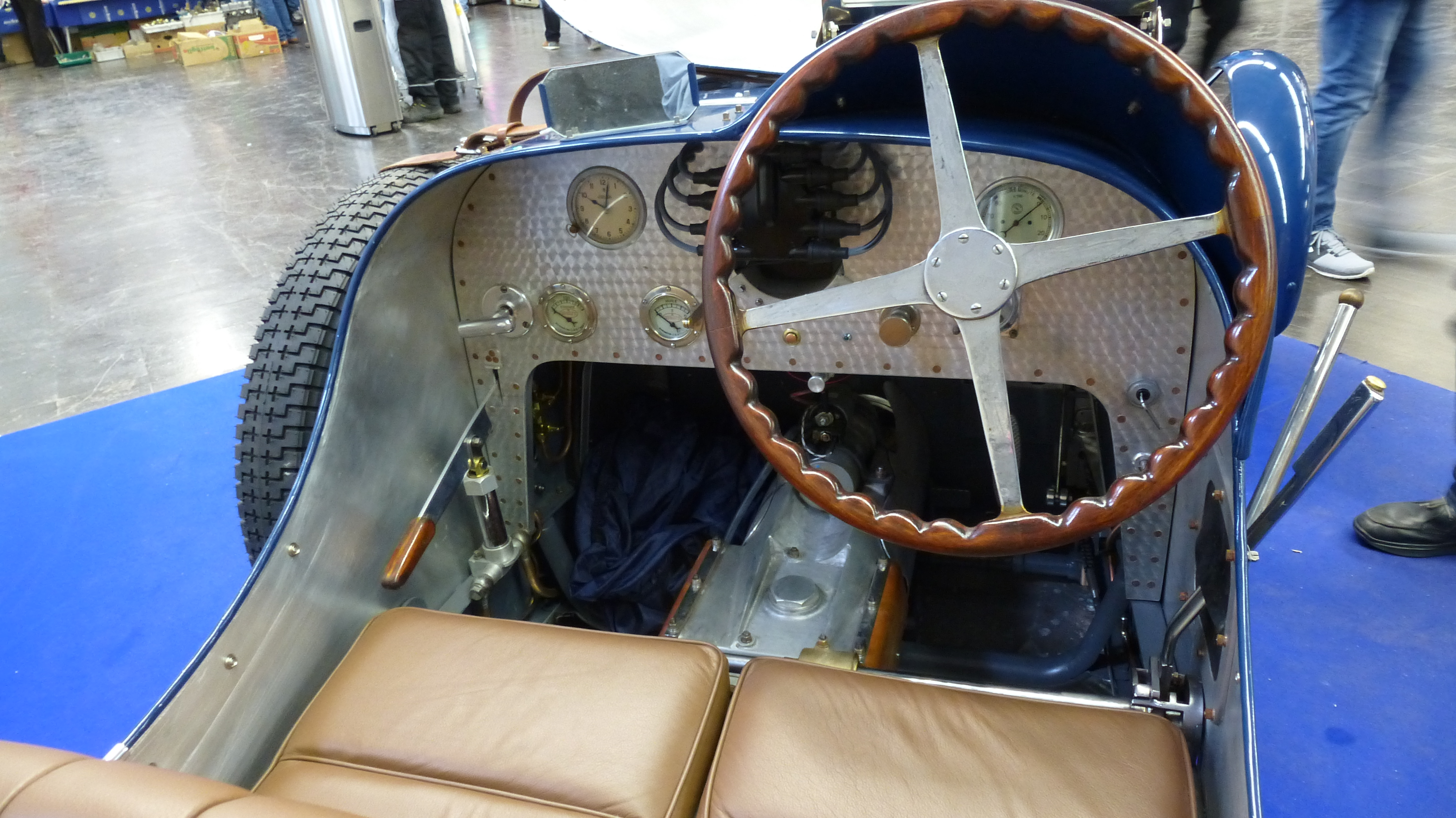 Pur Sang Bugatti 35 B Roadster Interieur